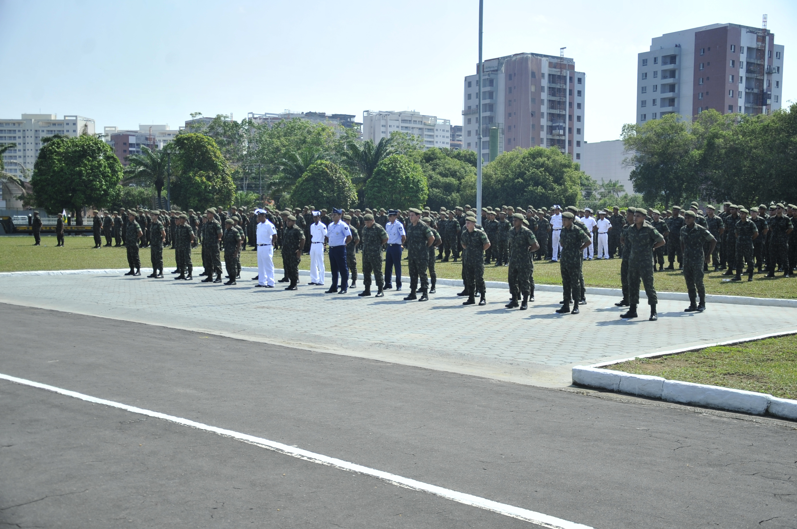 03/12/2014, Manaus - AM Fotos: PH Freitas